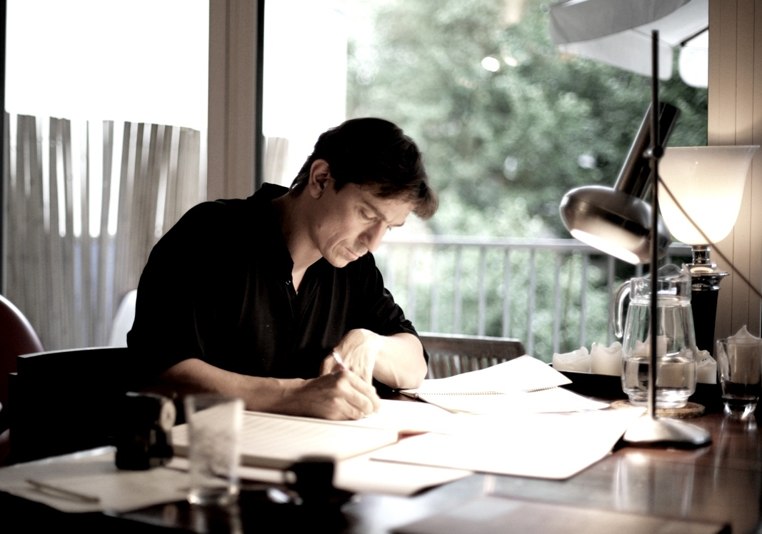 Christian Rieger - Foto: Laurenz Davit